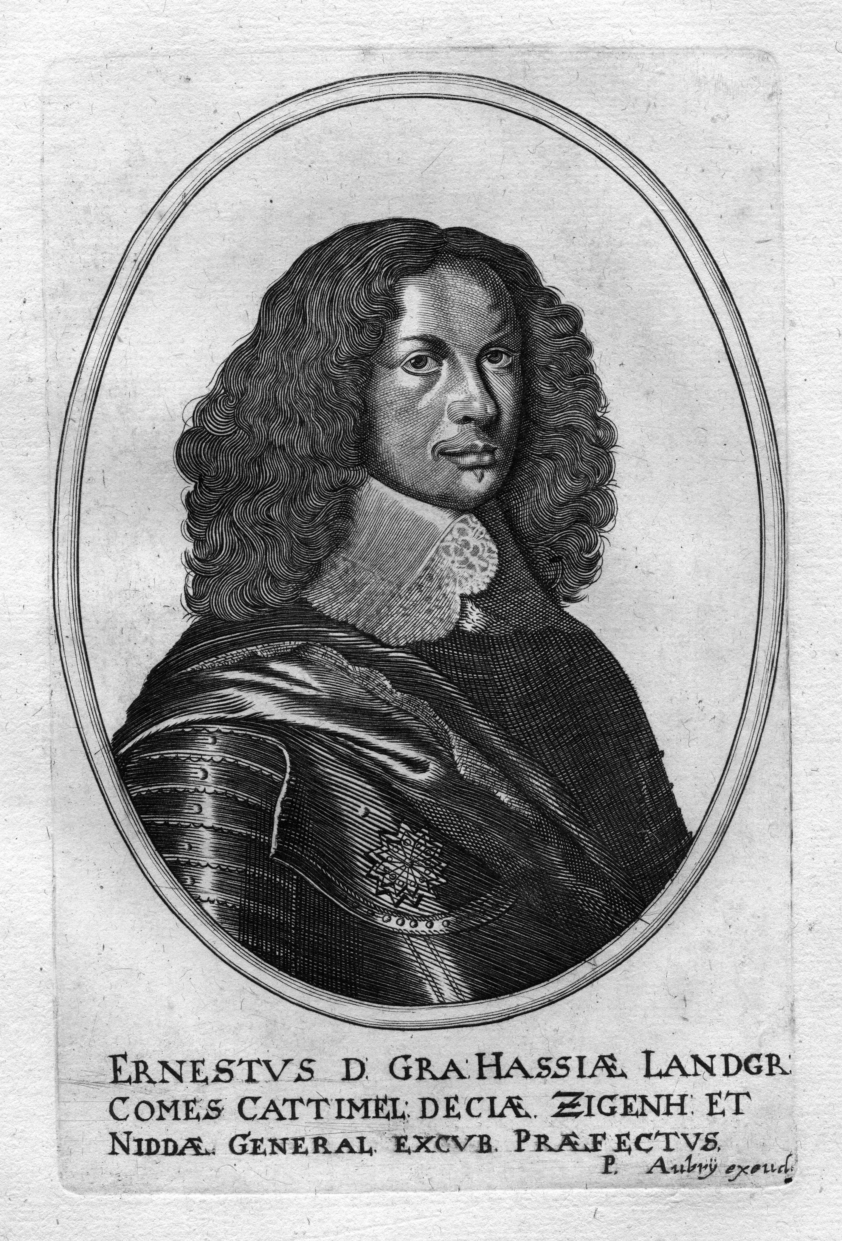 portrait gravé